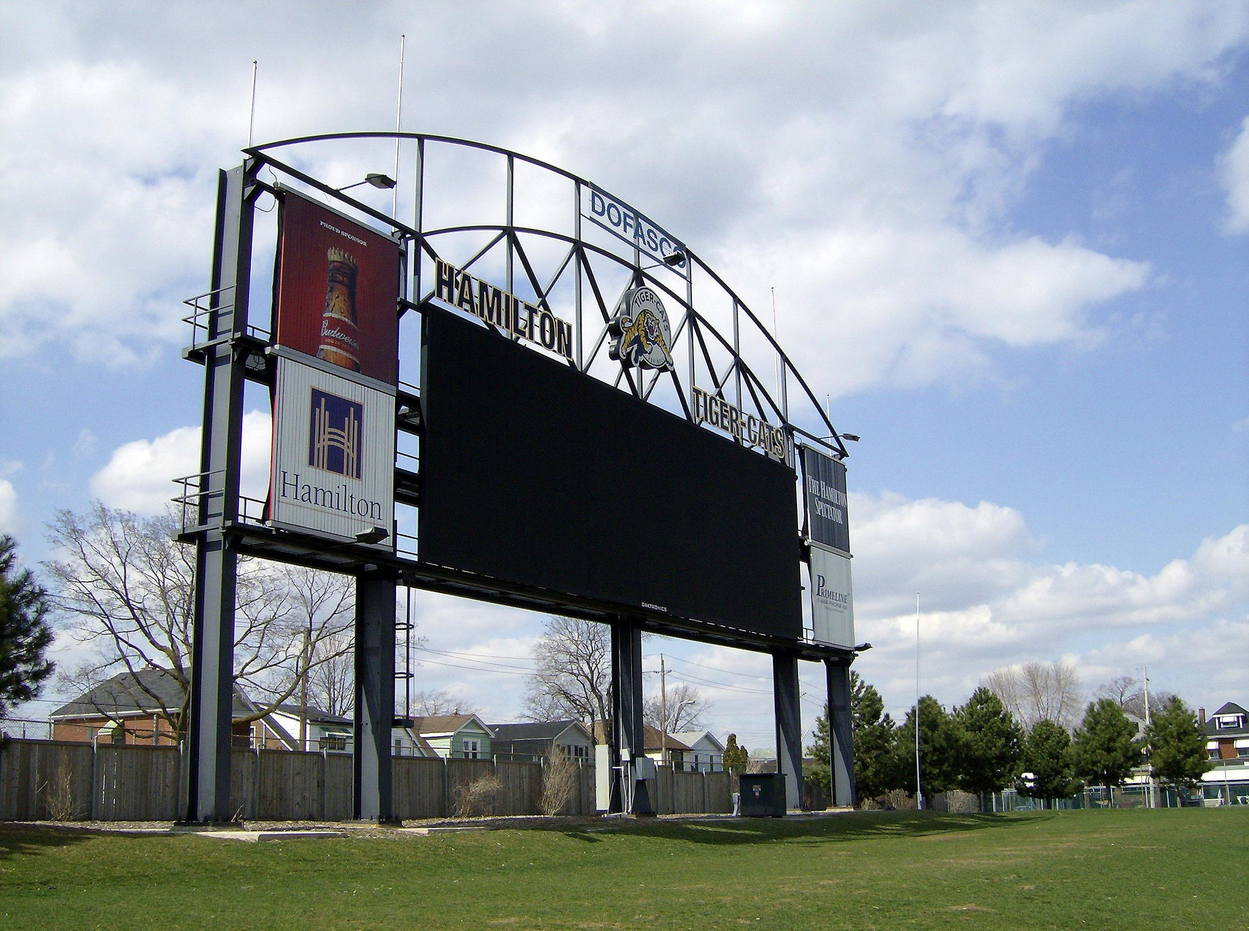 self made